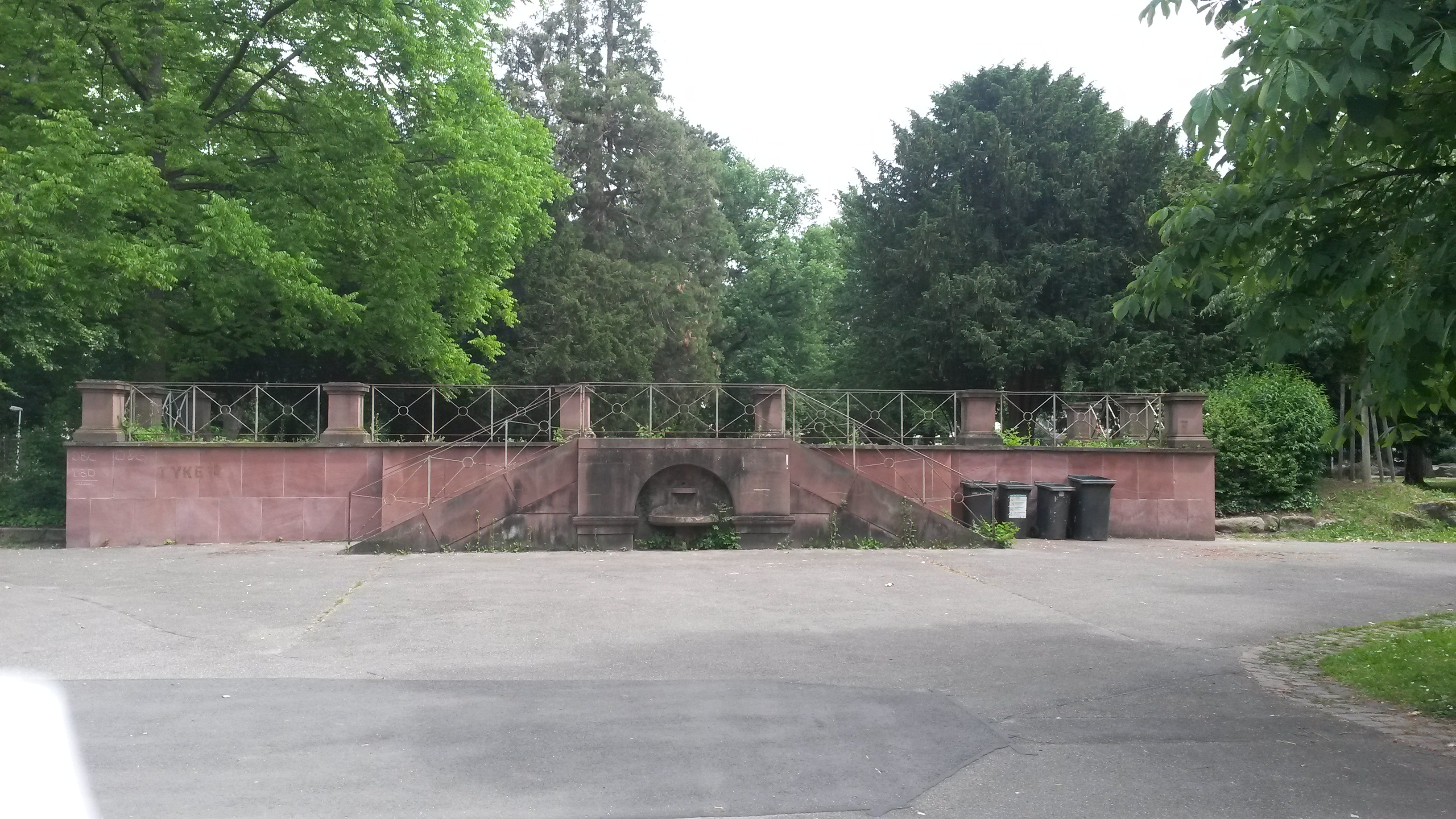 Amalienschlösschen (Karlsruhe)-Ruine